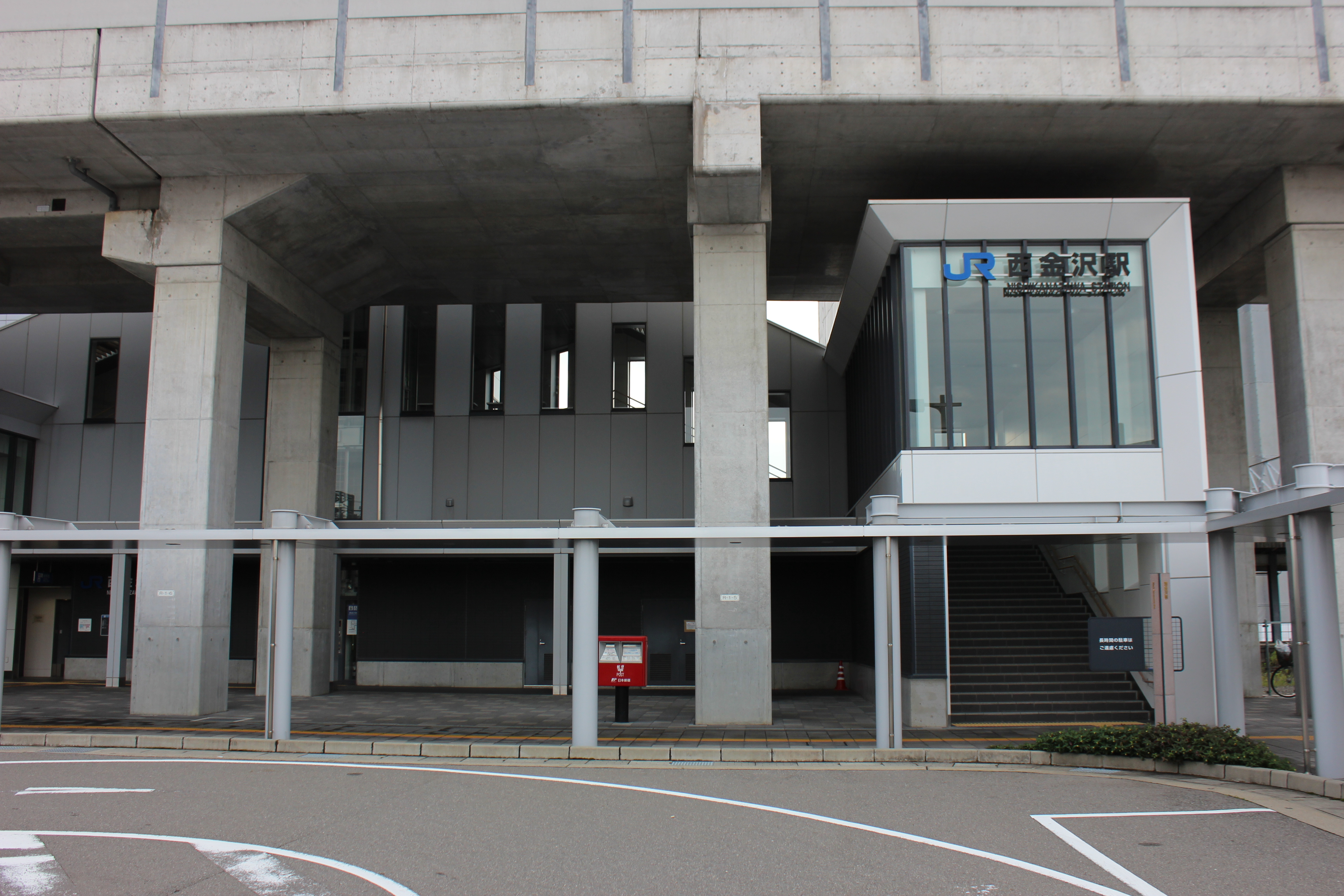 西金沢駅東口